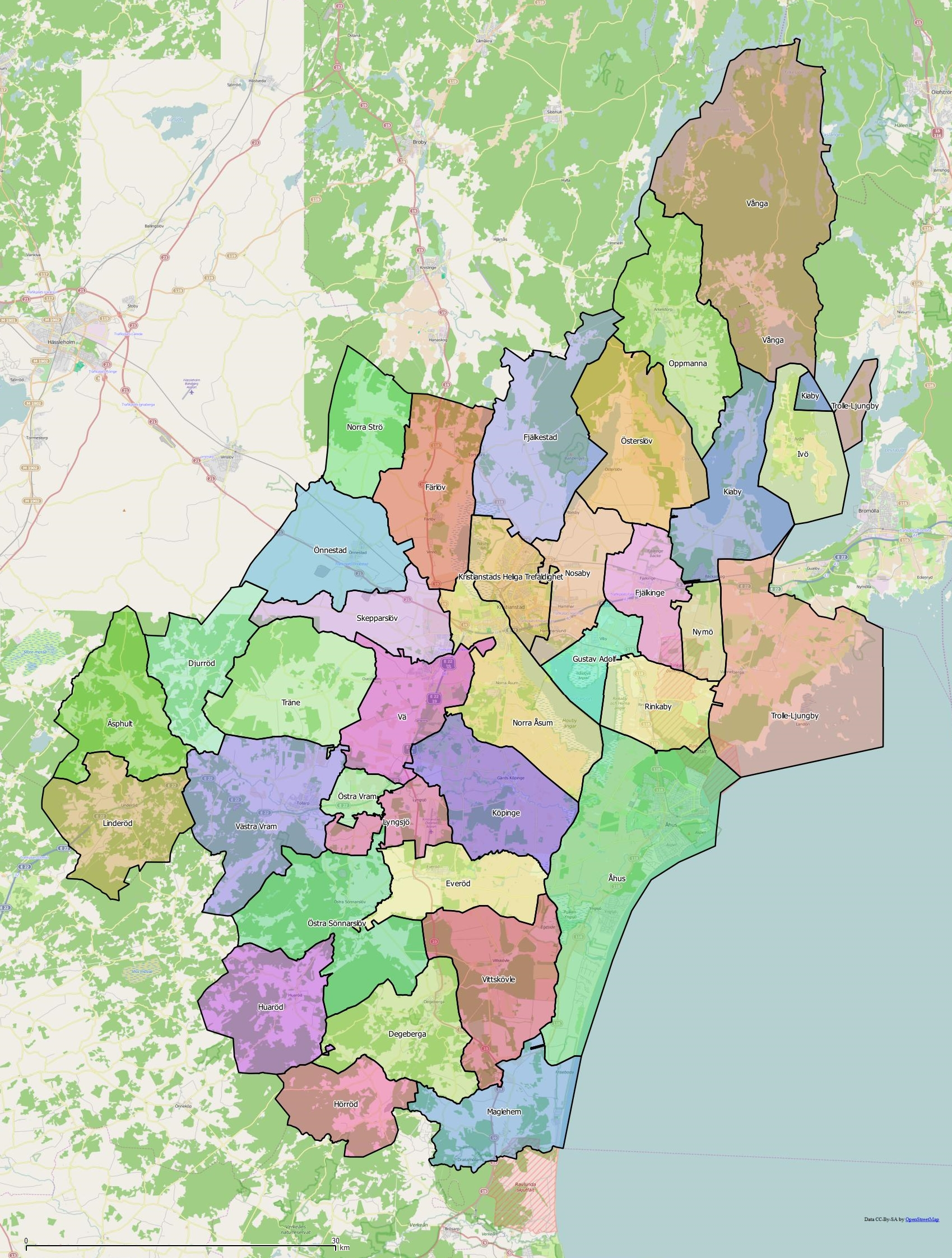 Distriktsindelningen i Kristianstads kommun